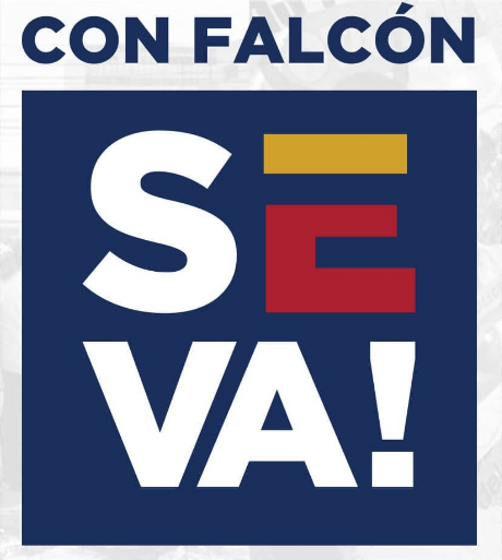 Campaña presidencial de Henri Falcón de 2018 "Con Falcón Se Va!"